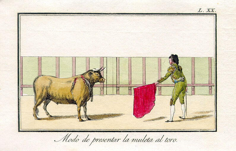 Delgado y Gálvez, José: Tauromaquia o arte de torear á caballo y á pie